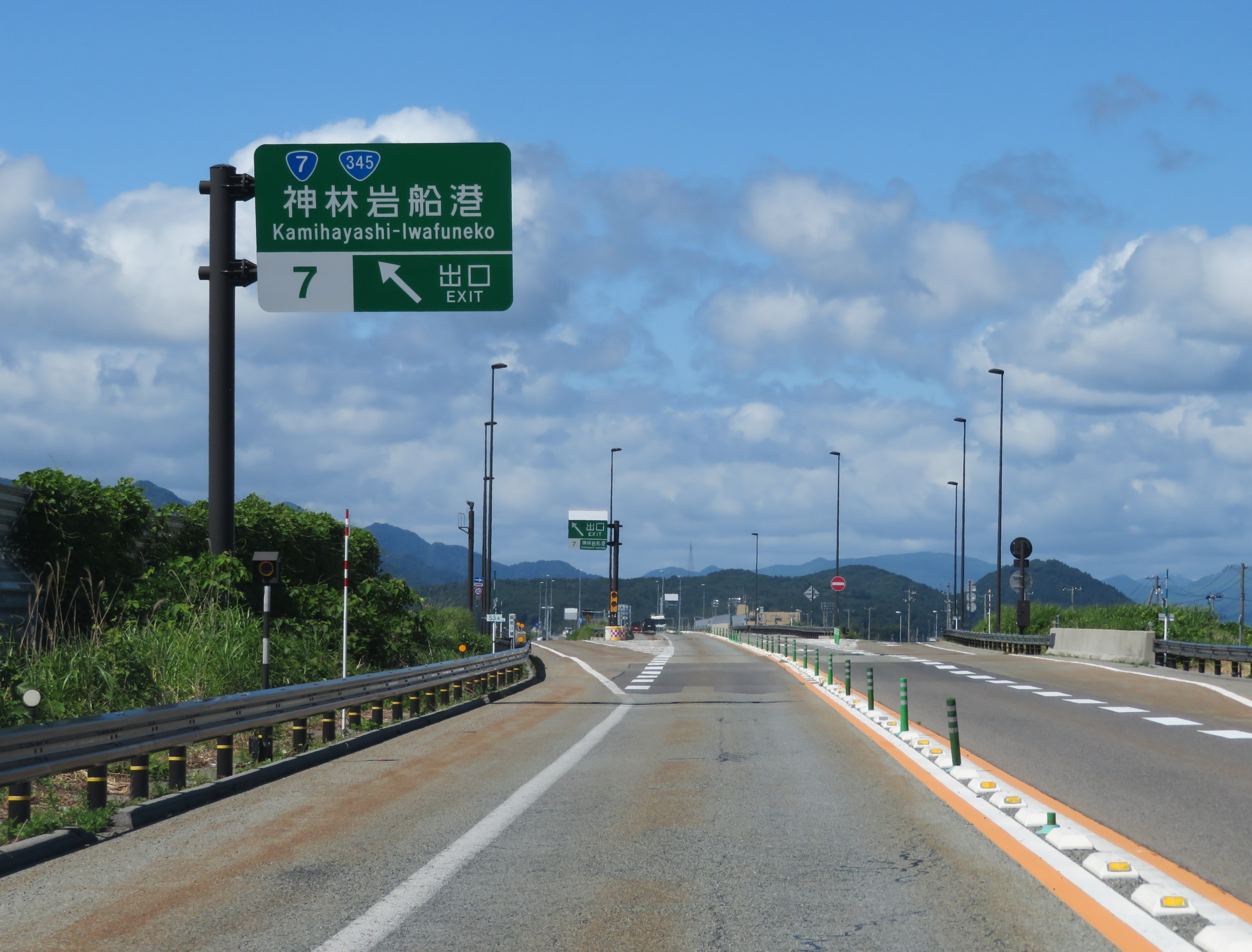 日本海東北自動車道神林岩船港ＩＣ（新潟方面側出入口付近を撮影） Canon PowerShot SX720 HS